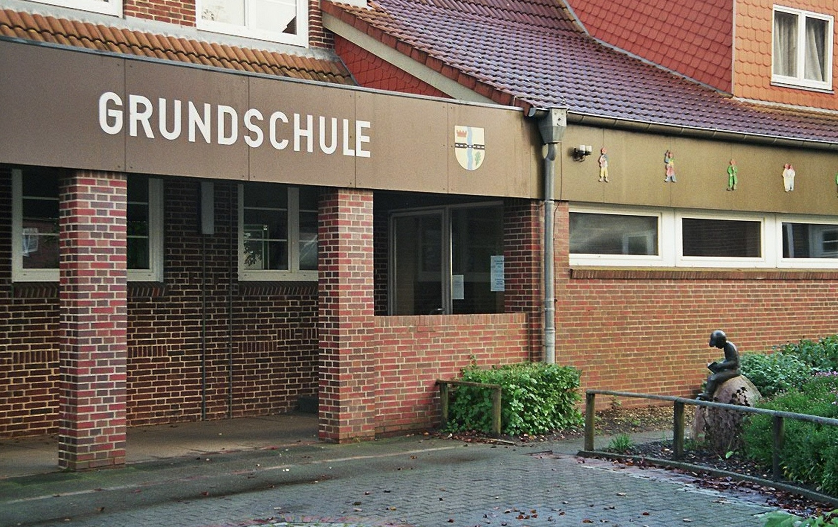 Source: made by WikiTour 2005 Description: (de:) Eingang der Grundschule in Treia